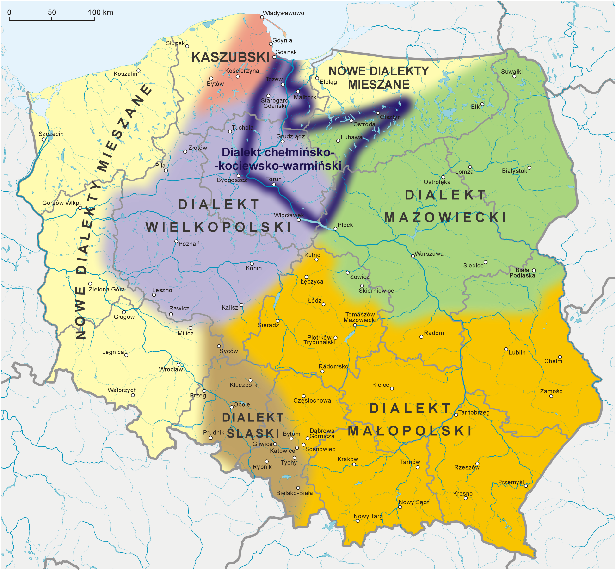 Zasięgi dialektów polskich wg S. Urbańczyka (zmodyfikowane), na podstawie Gwary polskie. Przewodnik multimedialny pod redakcją H. Karaś z zaznaczonym dialektem chełmińsko-kociewsko-warmińskim